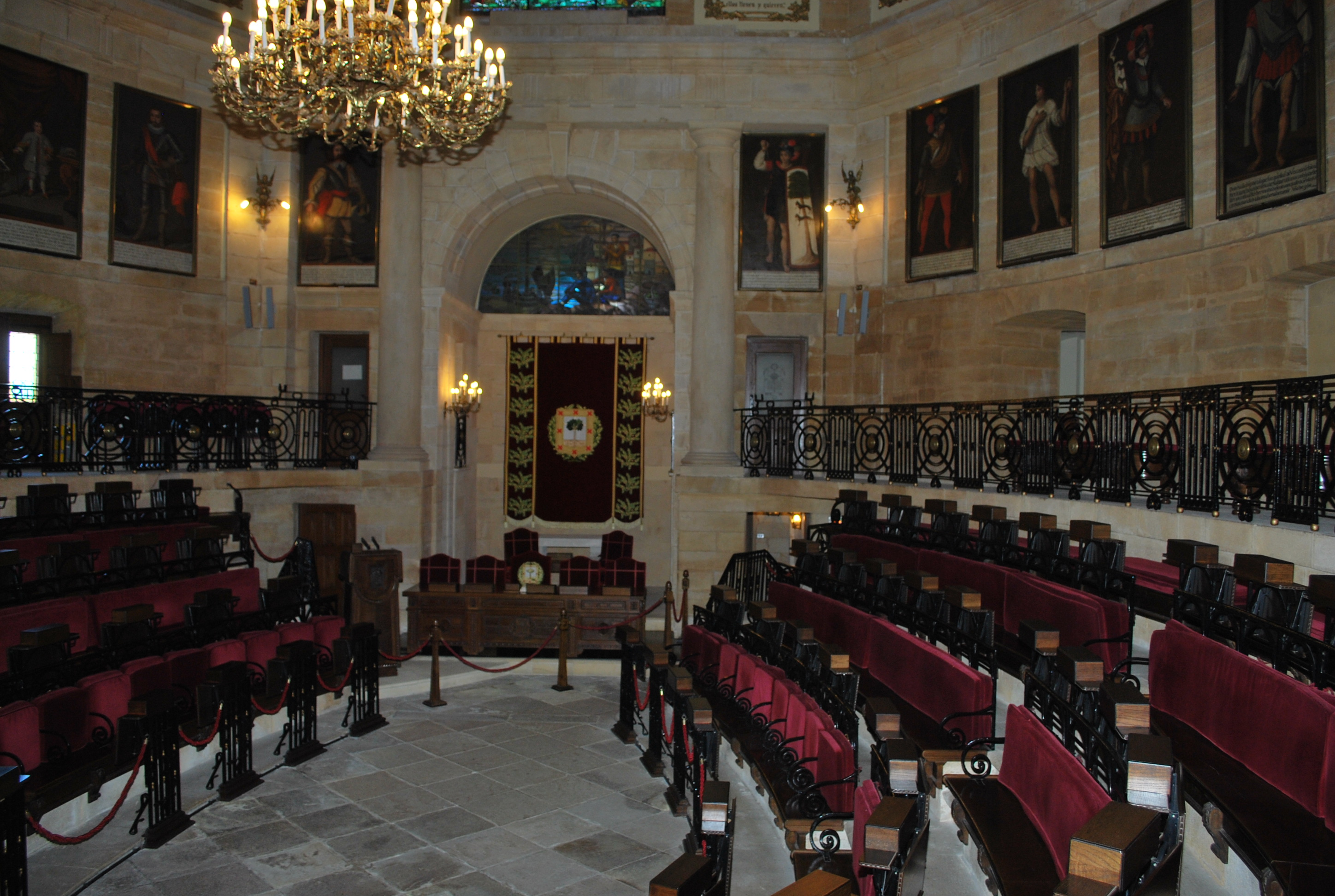 Vue générale du parlement foral de Biscaye (Batzarre Nagusia) à Gernika (Biscaye).